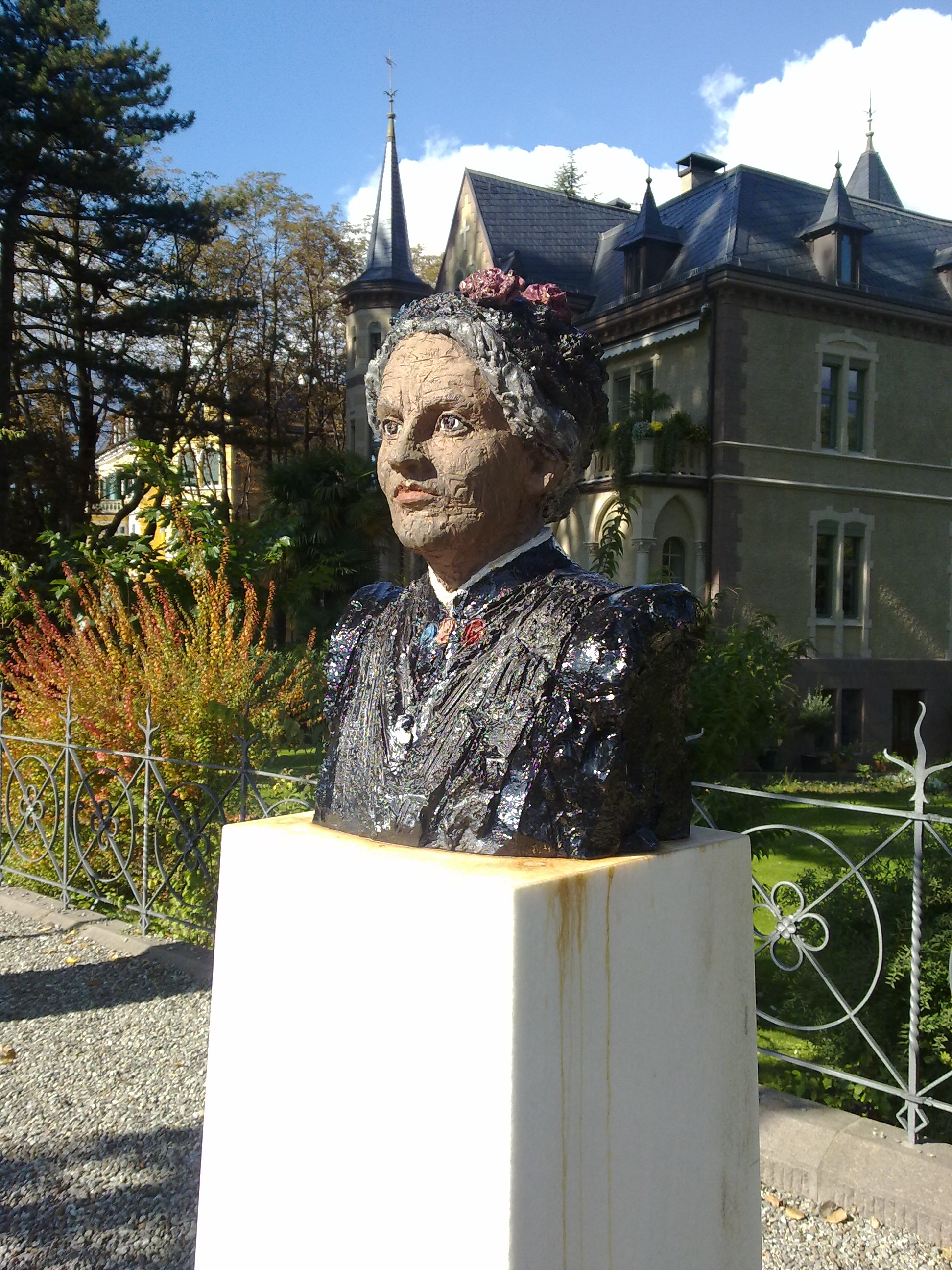 Stephan Balkenhol: Emma, Beitrag zum Meraner Kunst-Projekt "MenschenBilder", April 2015